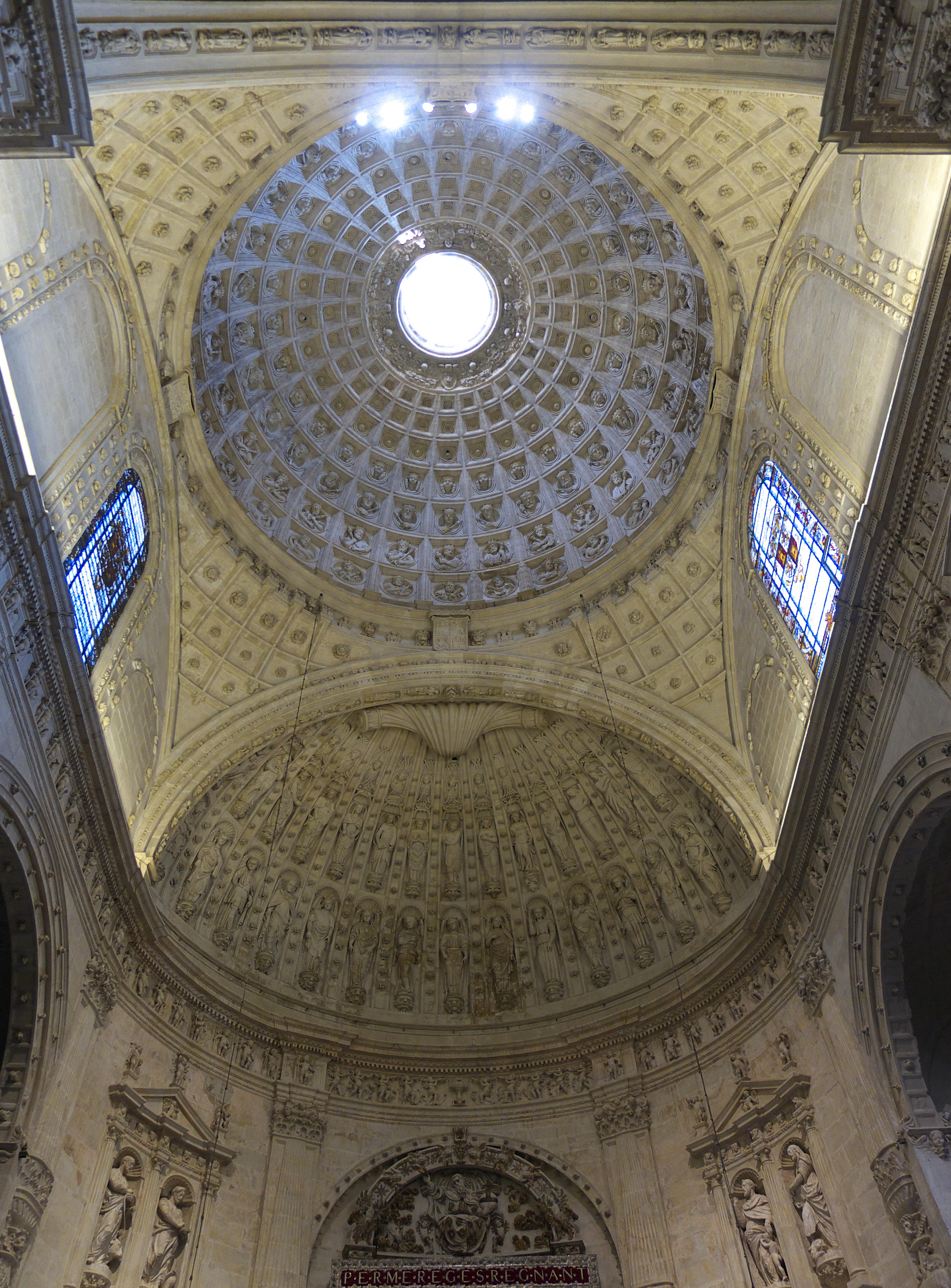 Pedro Díaz de Palacios, Juan de Maeda y Asensio de Maeda, terminan la bóveda casetonada de Hernán Ruiz II (1575).